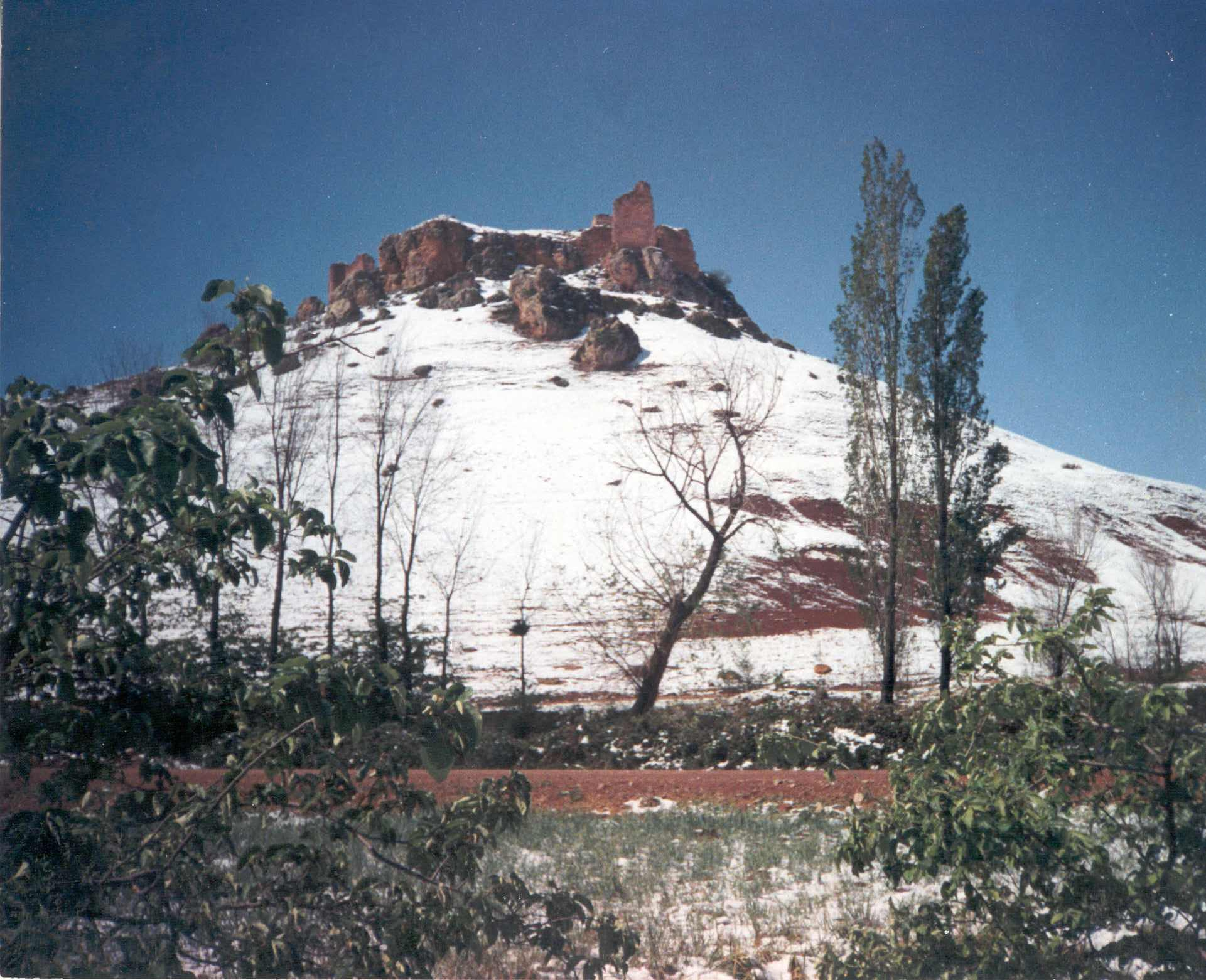 Castillo de la Estrella nevado. Castillo de la Estrella en la localidad de Montiel, provincia de Ciudad Real, comunidad autónoma de Castilla-La Mancha en España.